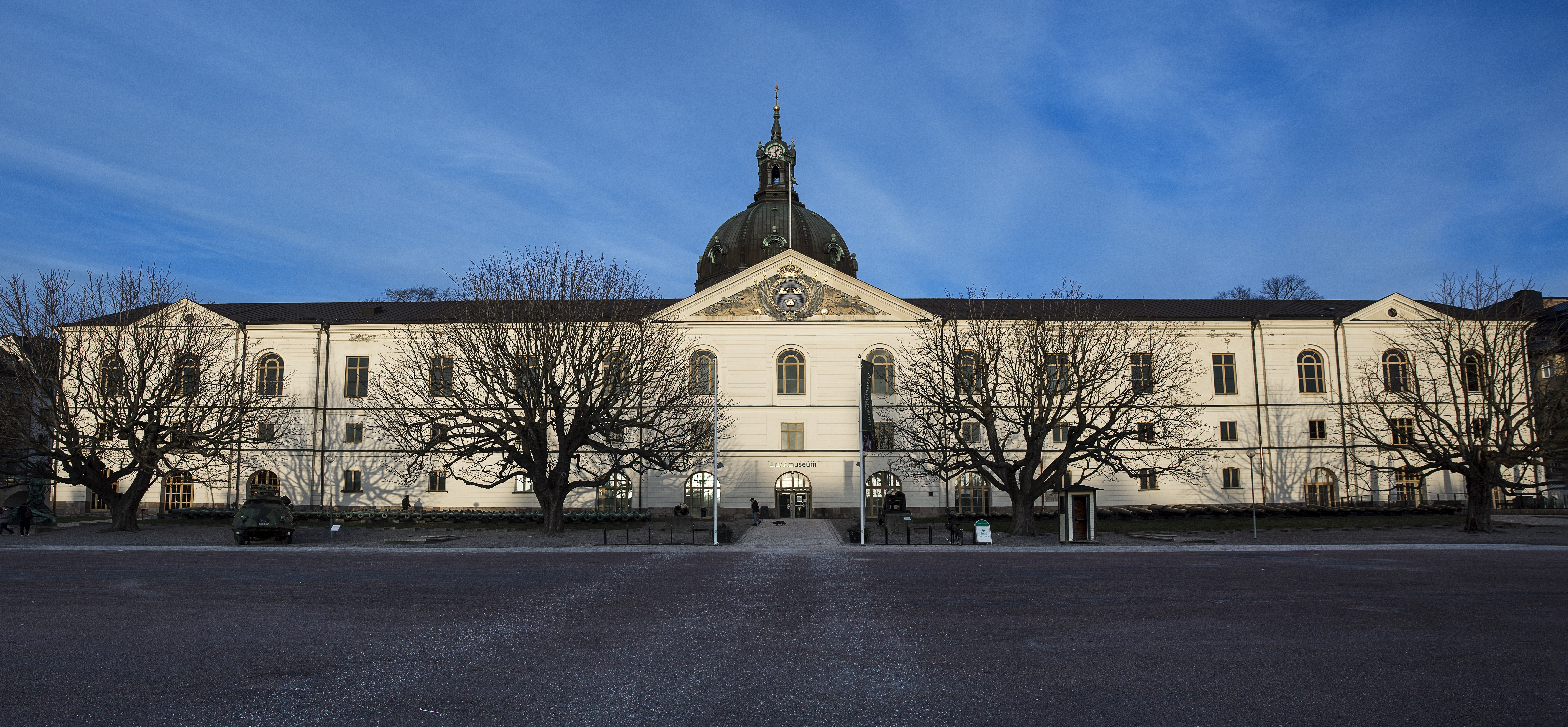 Armémuseum